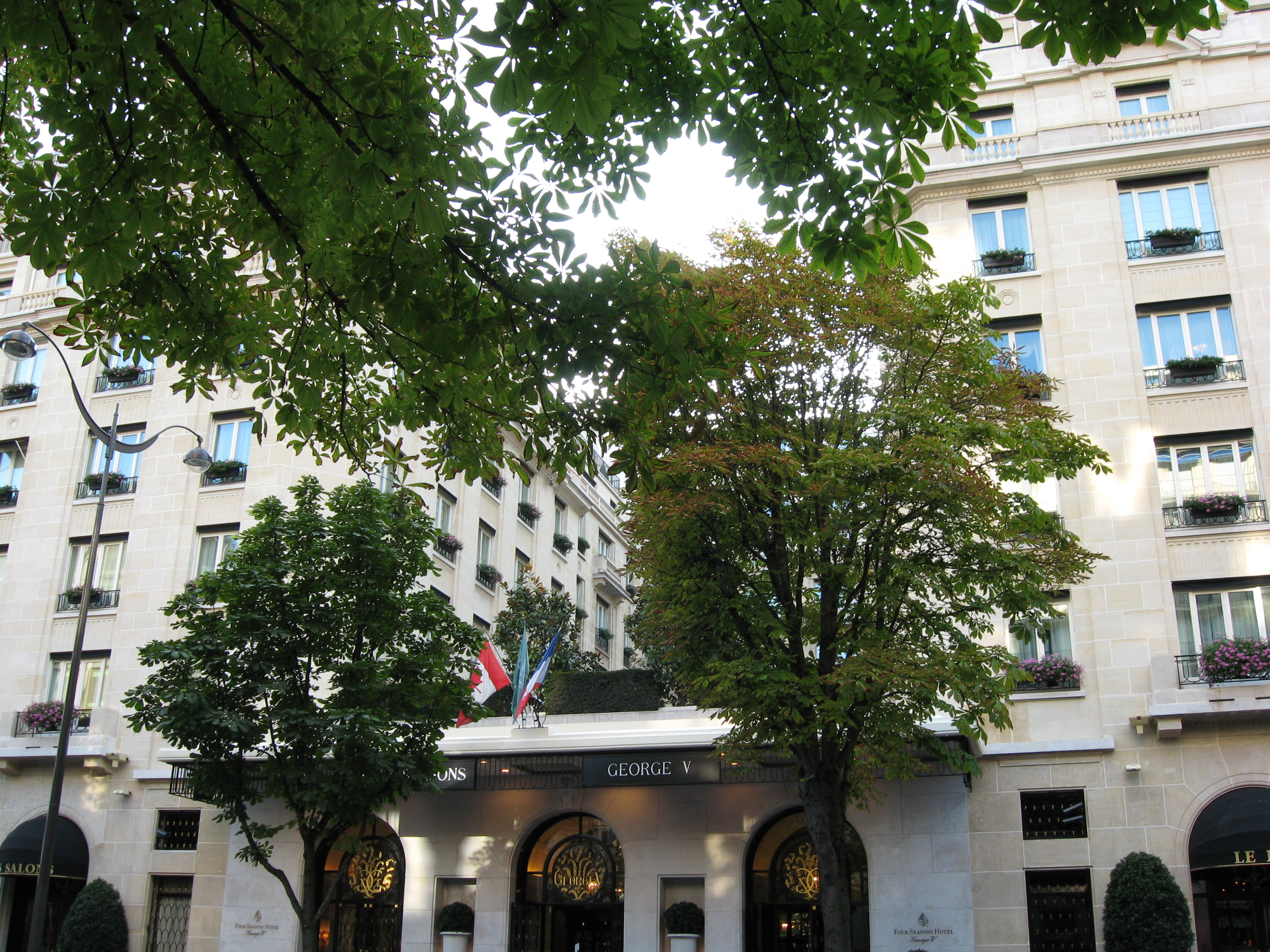 Hôtel George-V Paris